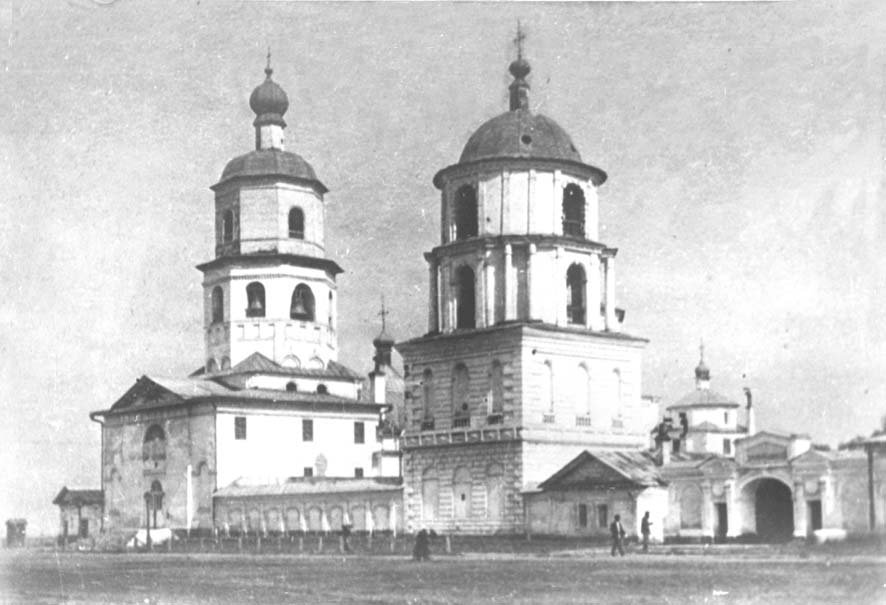 Иркутск. Богоявленский собор со стороны входа с Тихвинской улицы.